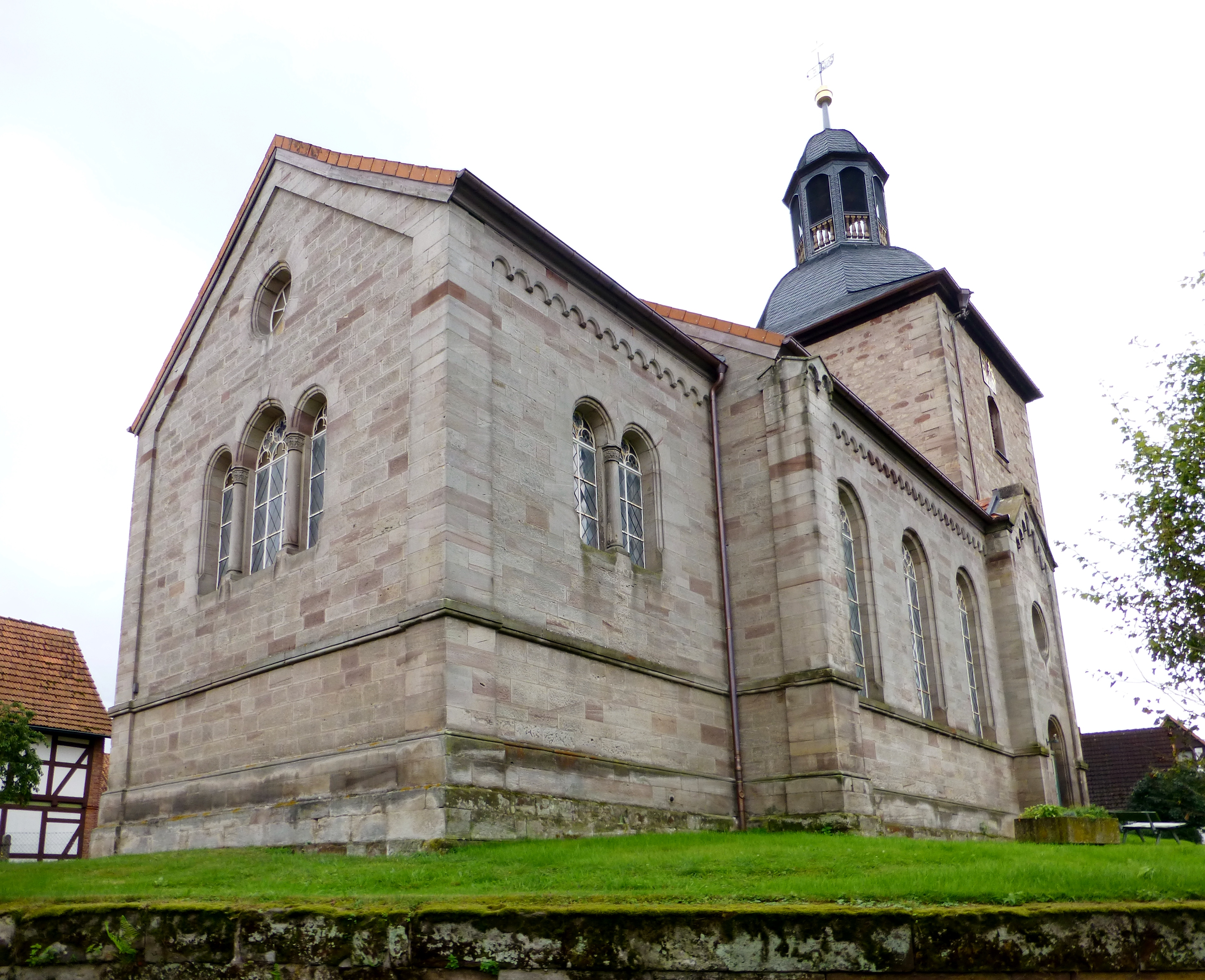 Evangelisch-luhterische Kirche St. Johannes der Täufer in Kerstlingerode, Gemeinde Gleichen, Südniedersachsen. Heute Tei der Apostel-Kirchengemeinde. Westturm von 1733 durch Carl Friedrich Freiherr von Schlitz gen. von Görtz, neoromanisches Langhaus 1857/57